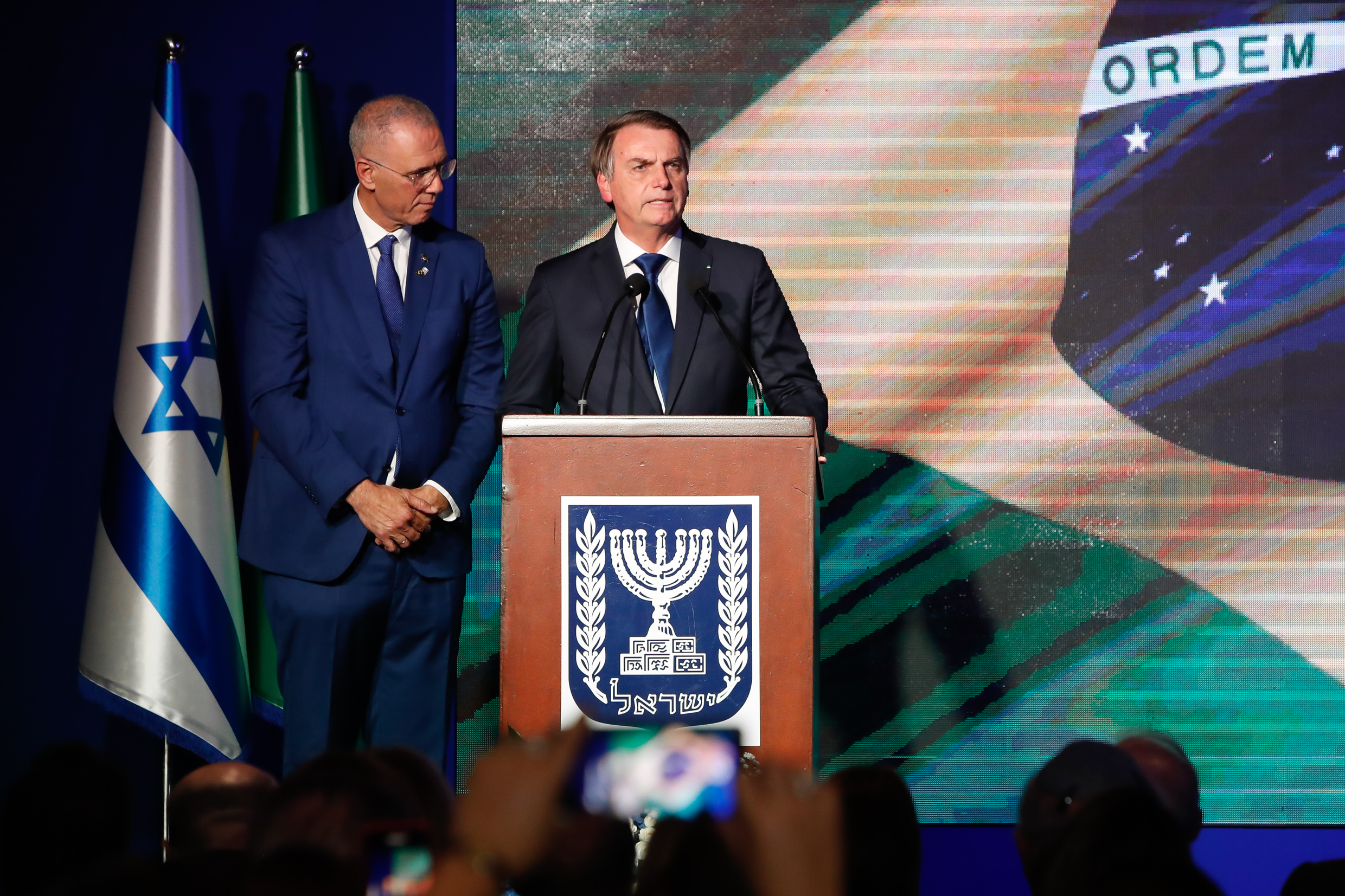 (Brasília - DF, 22/05/2019) Palavras do Presidente da República, Jair Bolsonaro.Foto: Alan Santos/PR